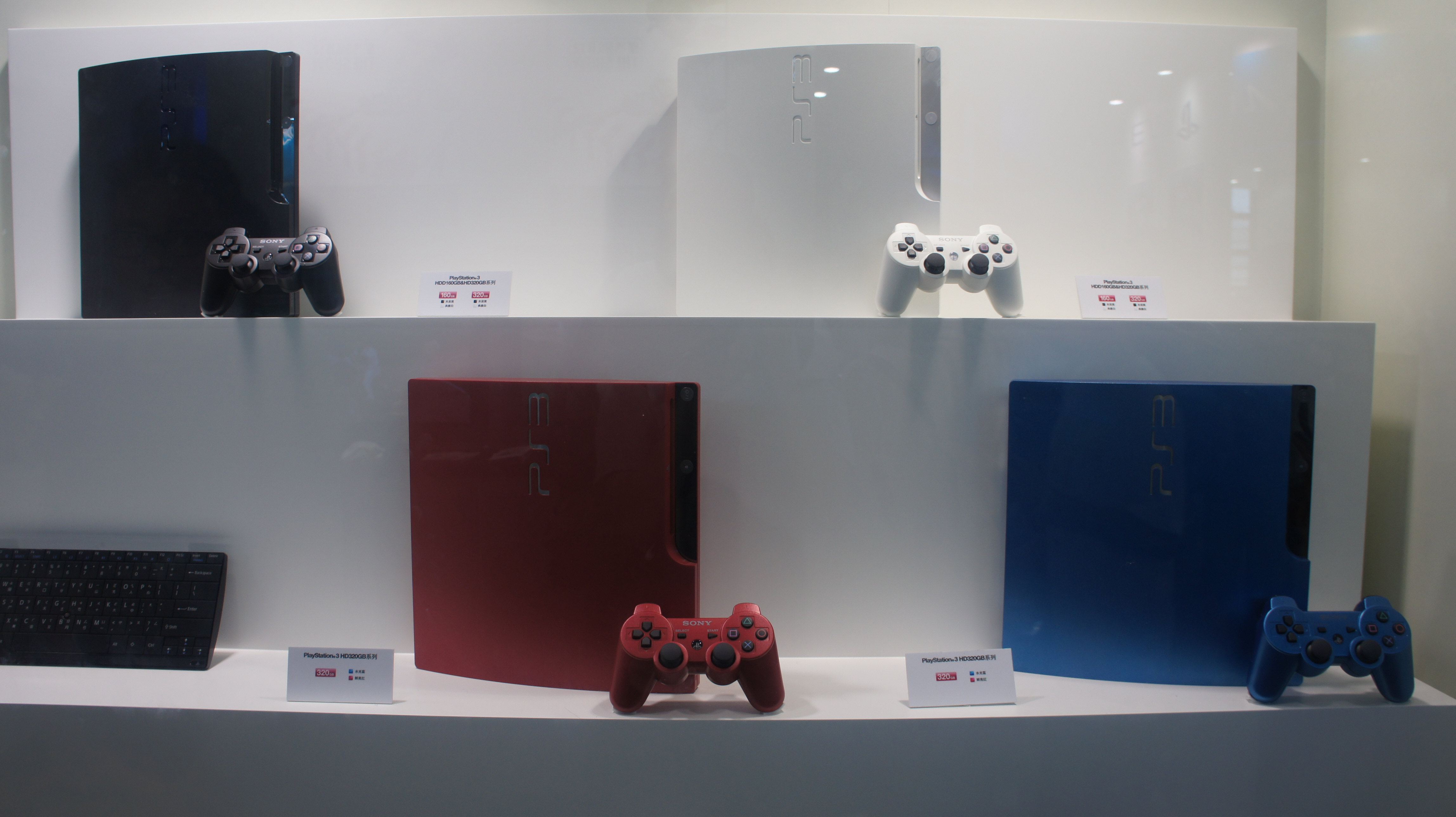 2012年CJ展览上SCE柜台上展出的PS3游戏主机四种色彩外观，主机为港版